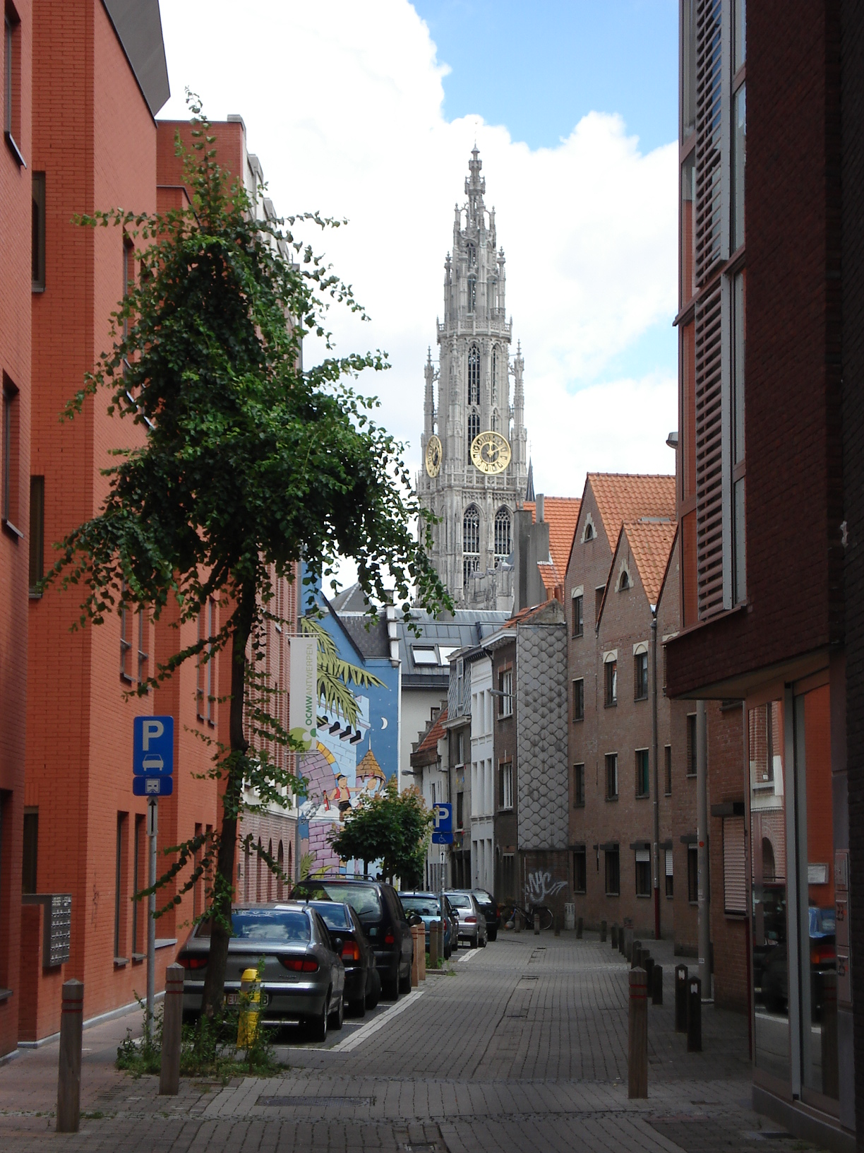 Lange Ridderstraat Sint-Andrieskwartier Antwerpen Anvers